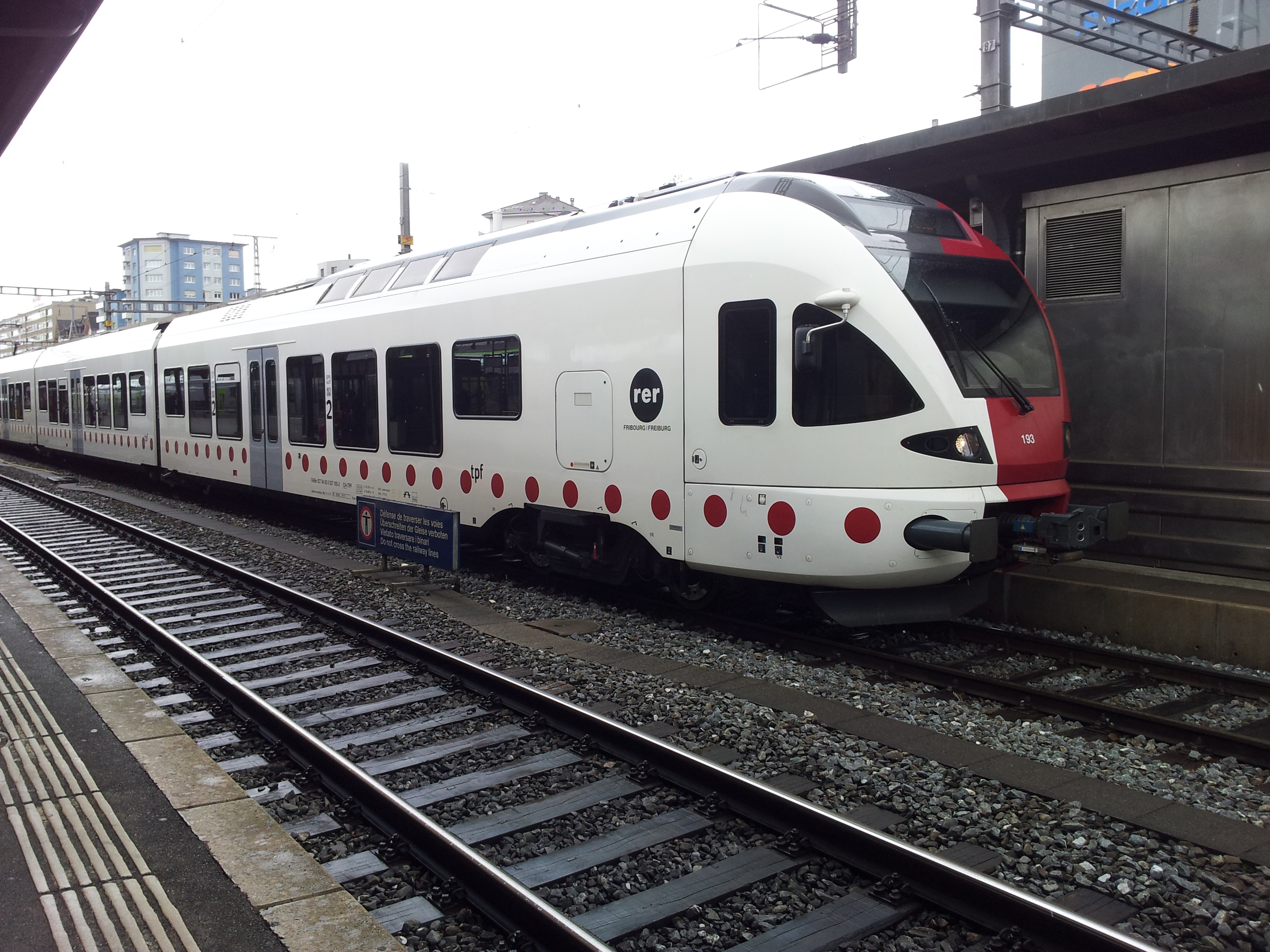 Freiburg en gare de Fribourg